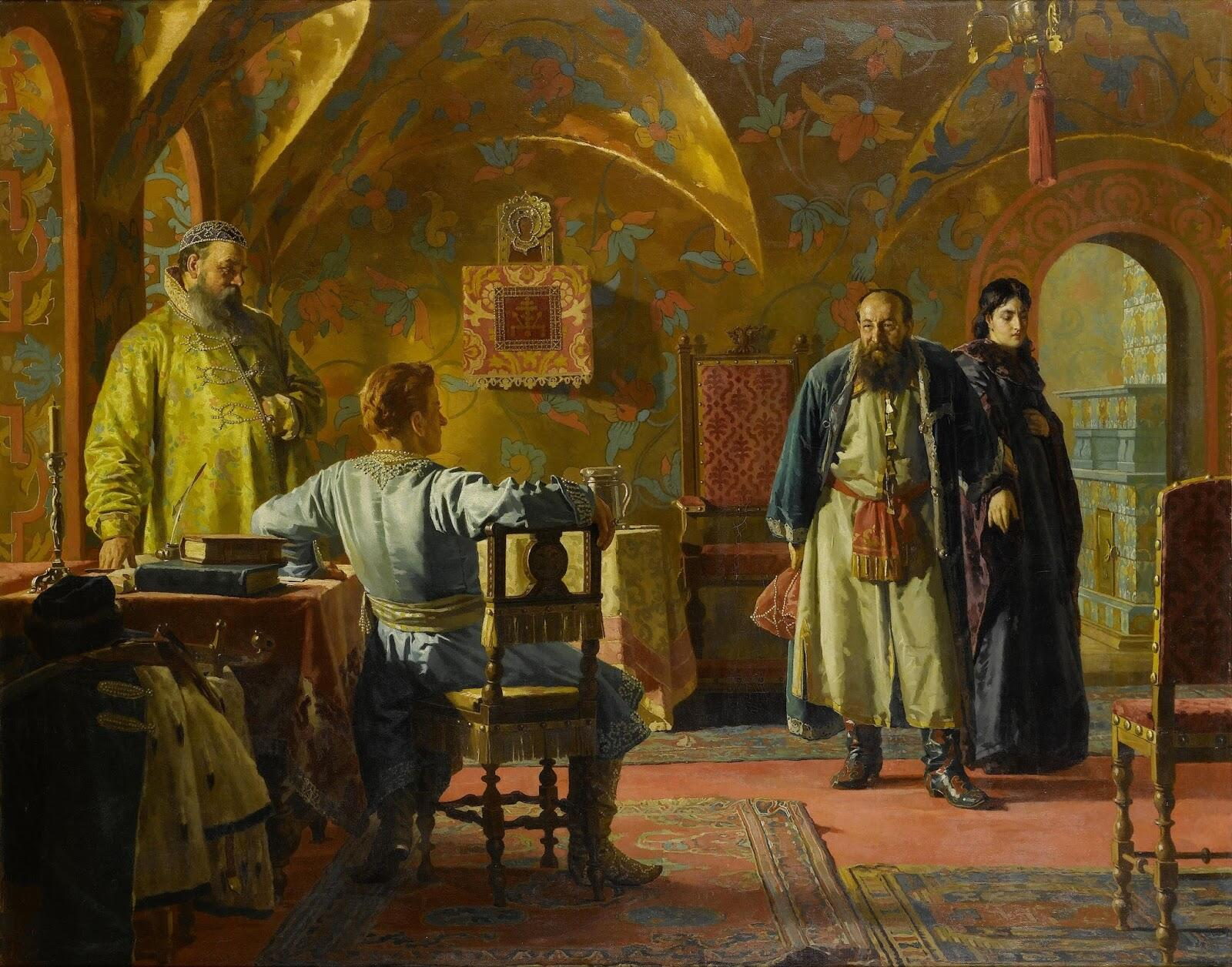 Ksenia Godunova taken to False Dmitriy Н.В. Неврев. «Представление Ксении Годуновой Дмитрию Самозванцу», галерея «Мастера».